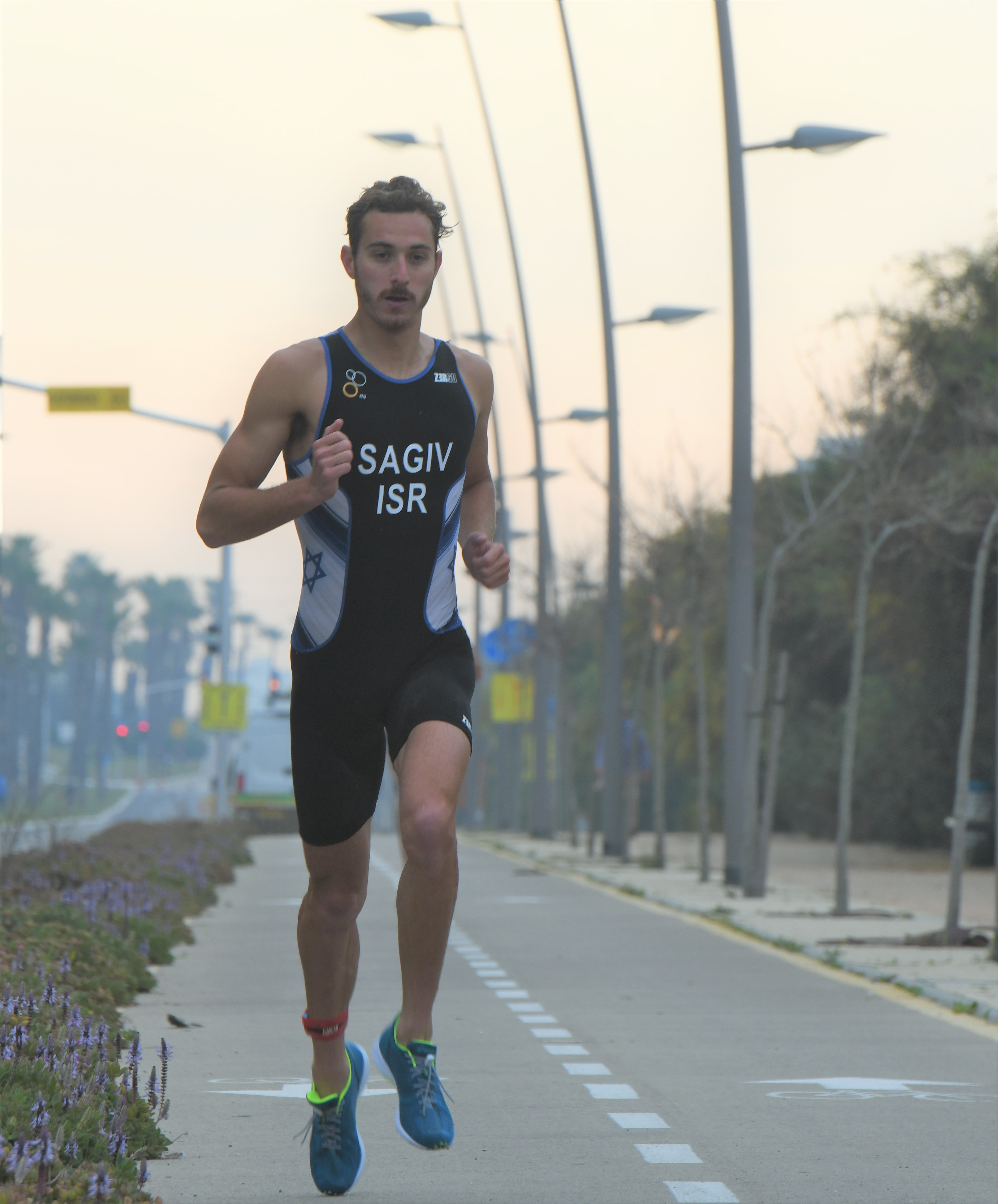 שחר שגיב